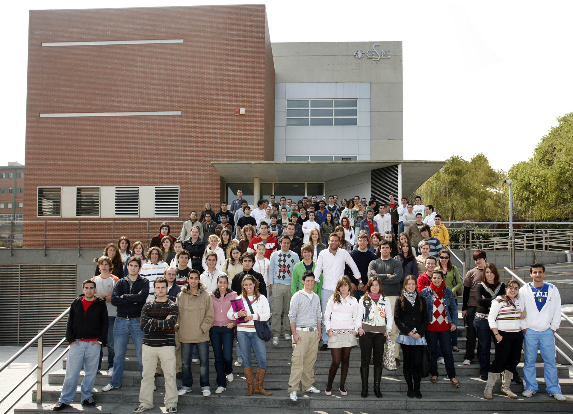 ALUMNOS CESINE